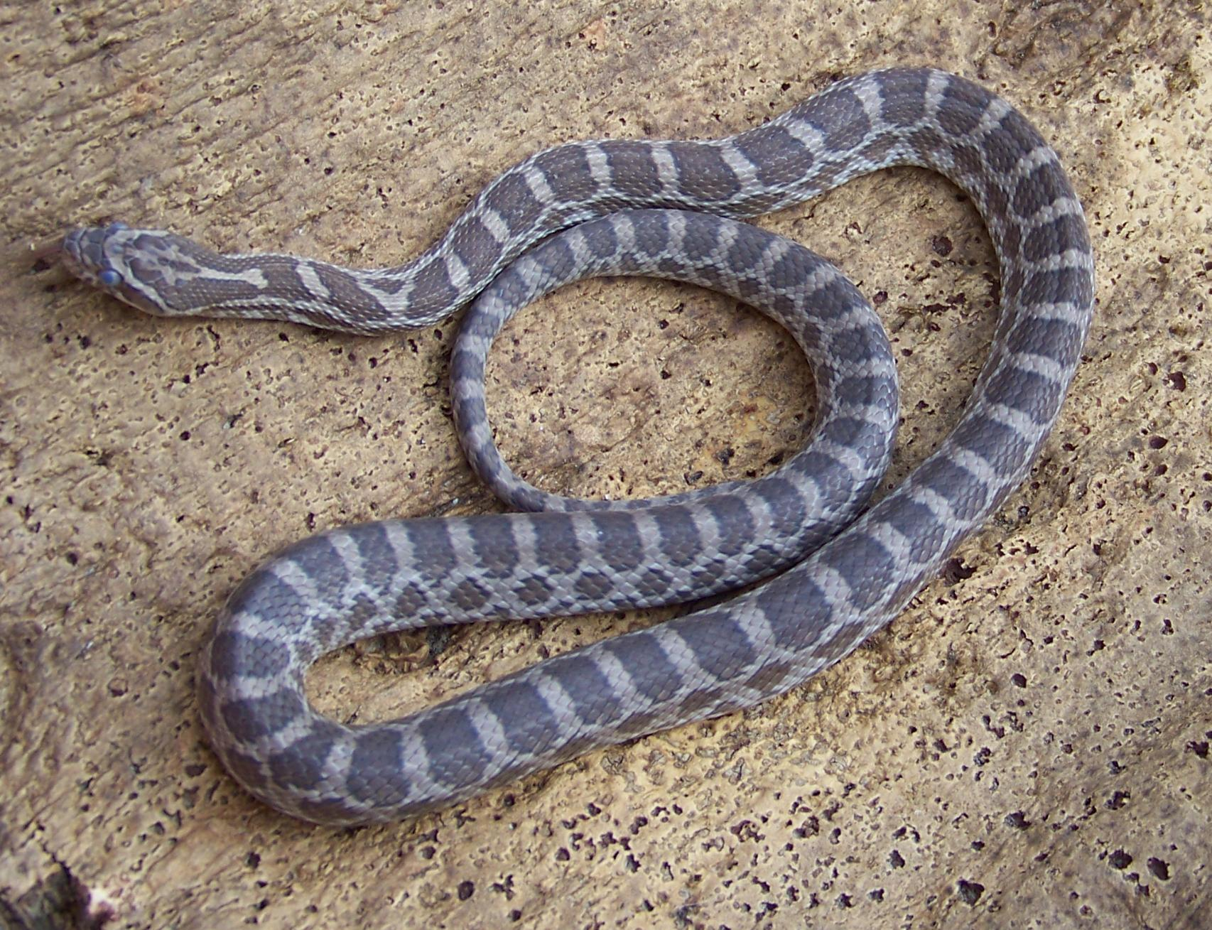 Pantherophis emoryi